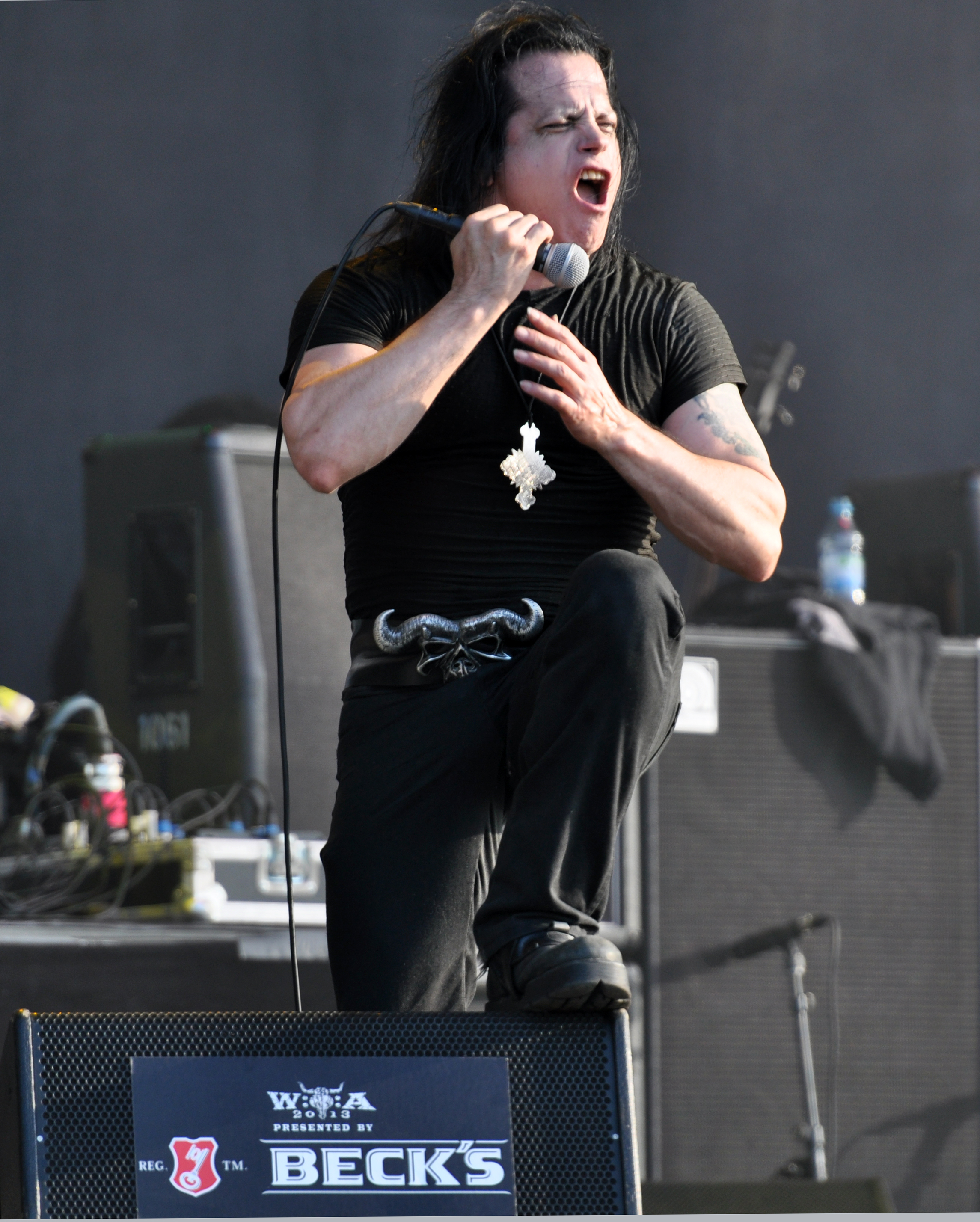 Danzig at Wacken Open Air 2013